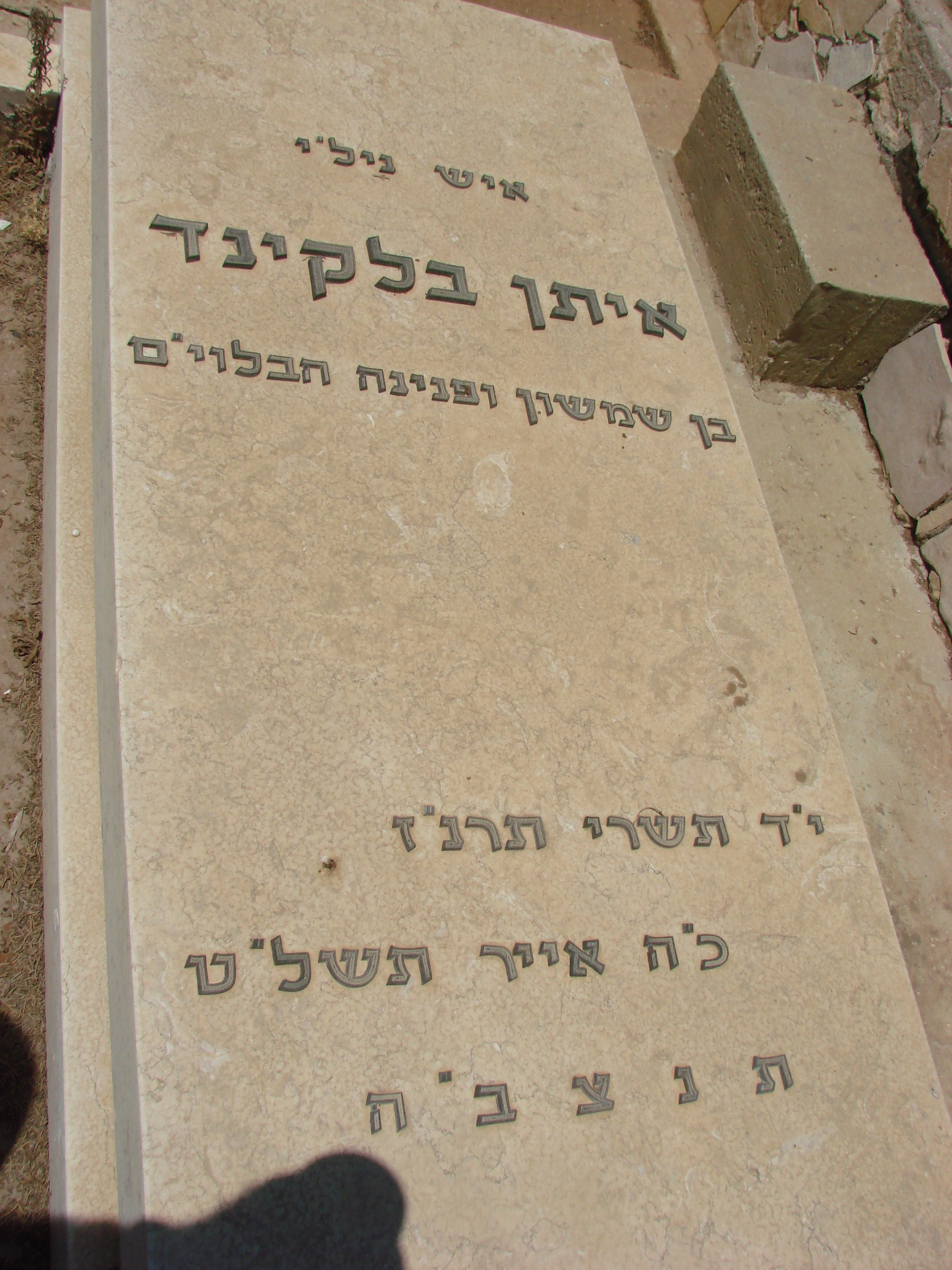 קברו של איתן בלקינד בראשון לציון